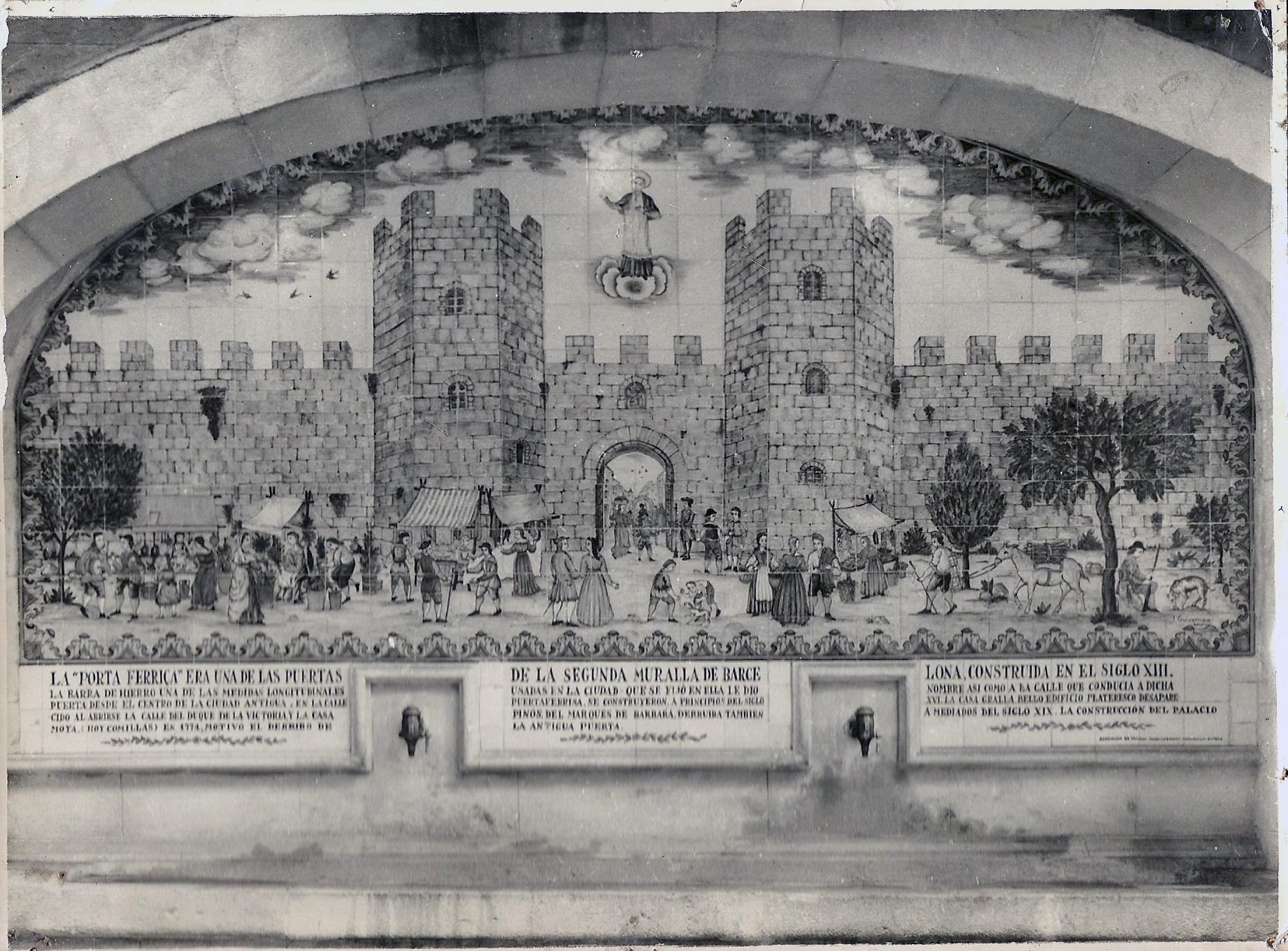 Plafó de la font de Portaferrisa obra de Joan Guivernau , innaugurat a les festes de la Mercè de 1959